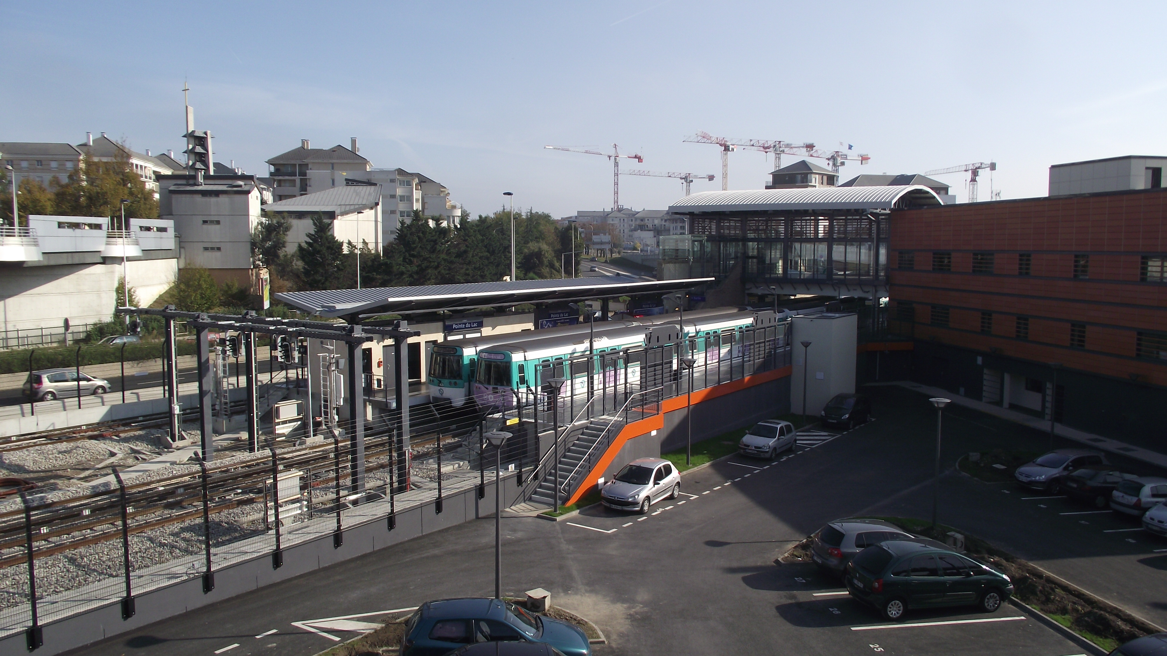 Pointe du Lac metrostation